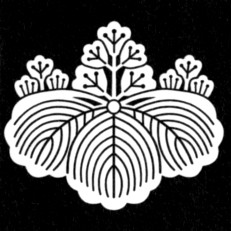 五三桐、植田氏